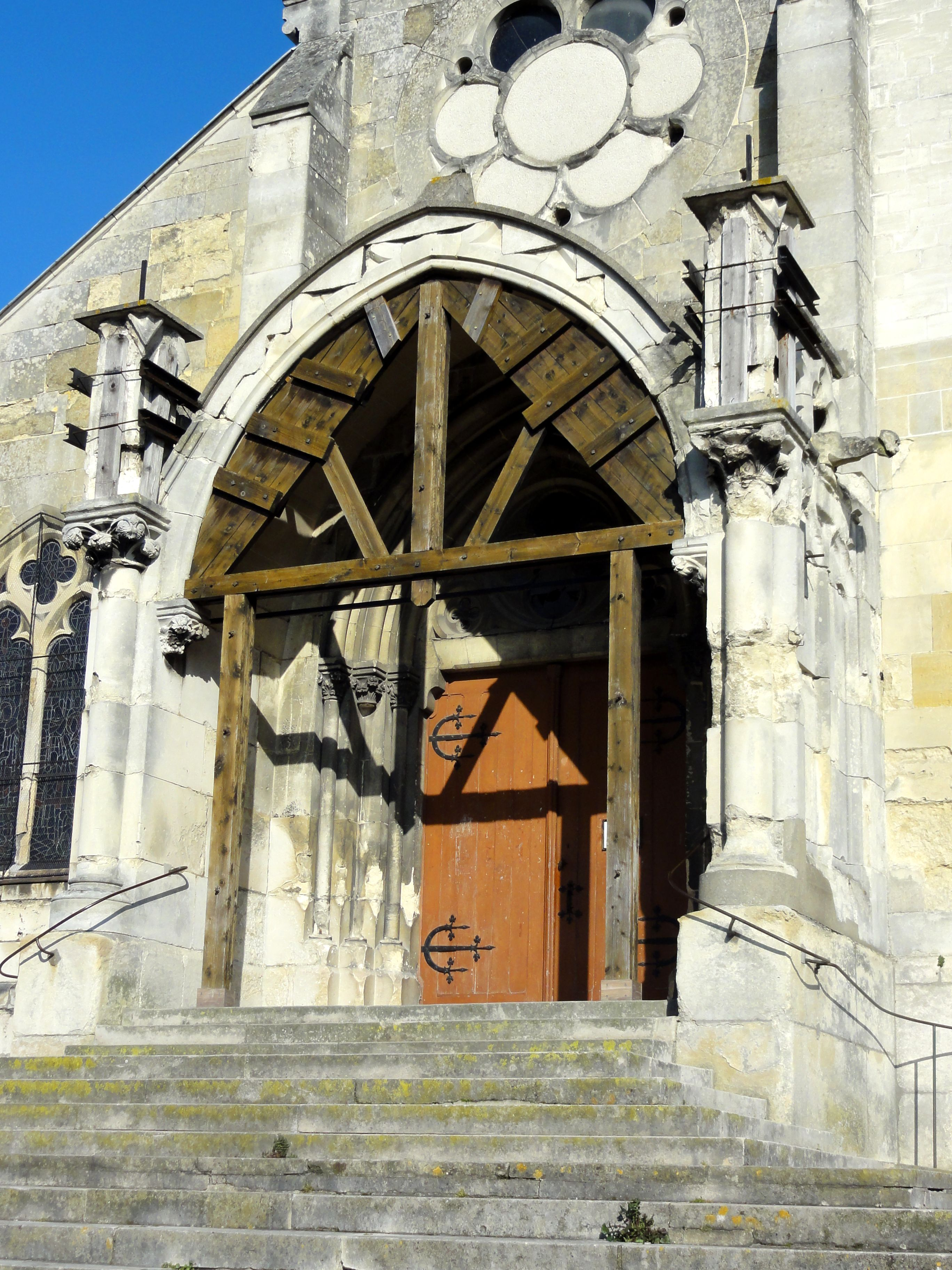 Porche néogothique.